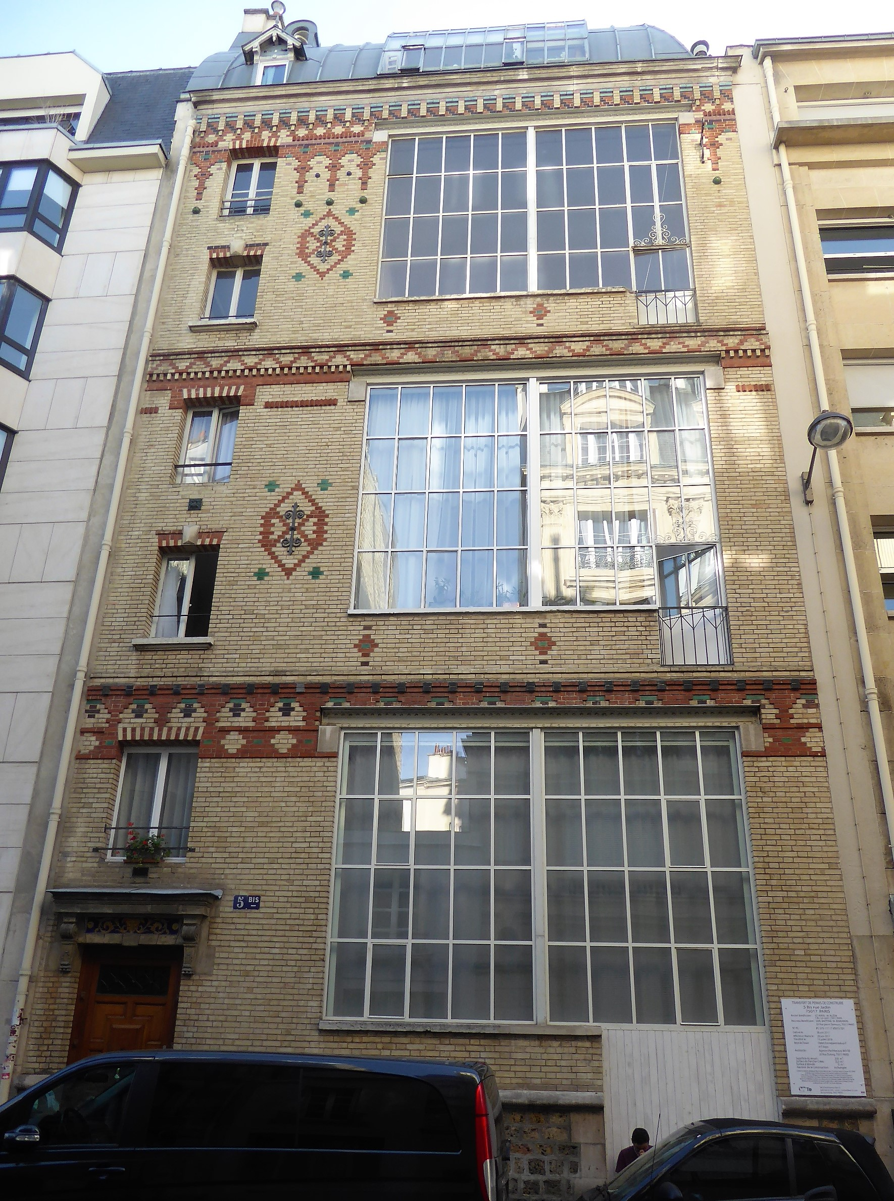 Rue Jadin 5bis